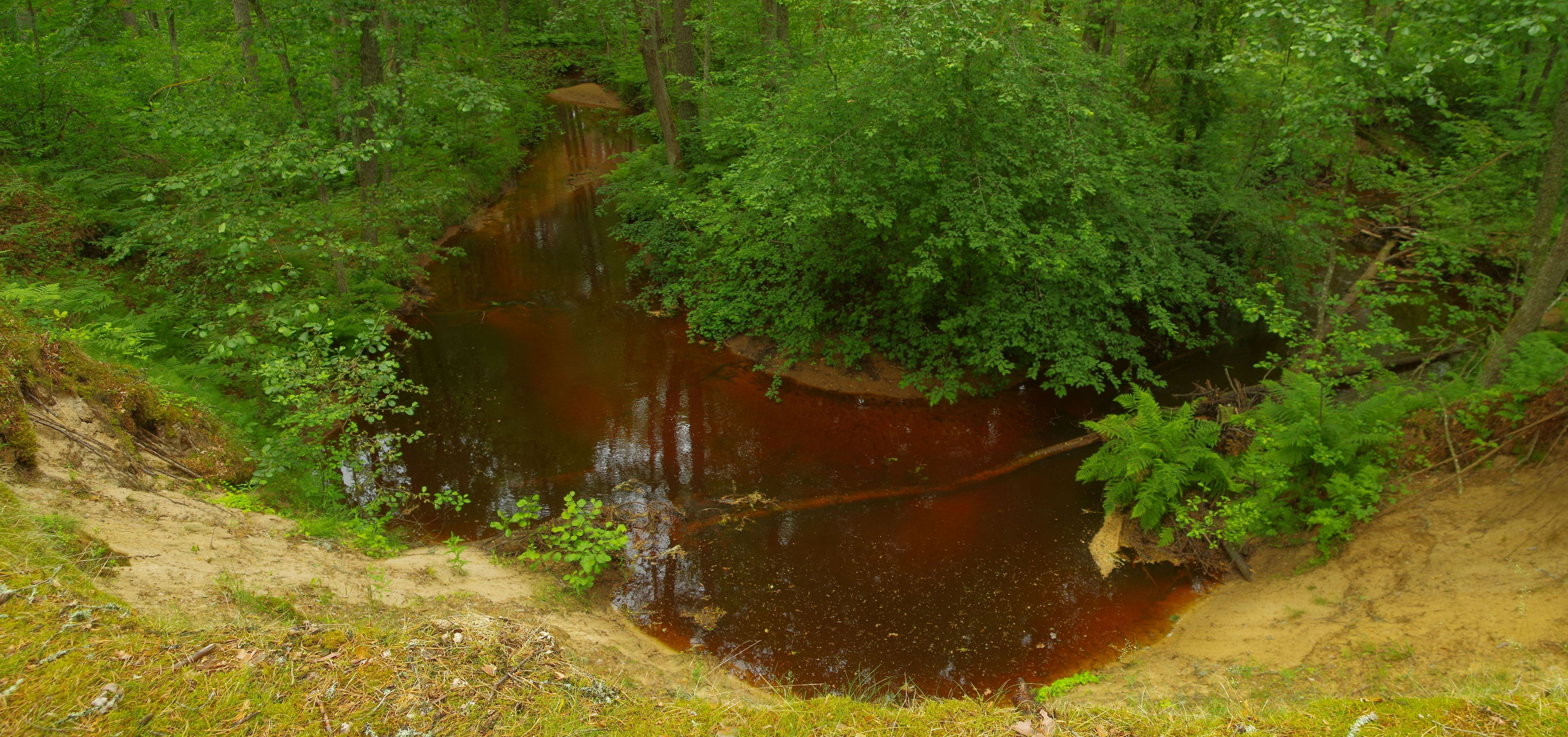 Kauksi oja asub Kauksi külas, Iisaku vallas, Ida-Virumaal.